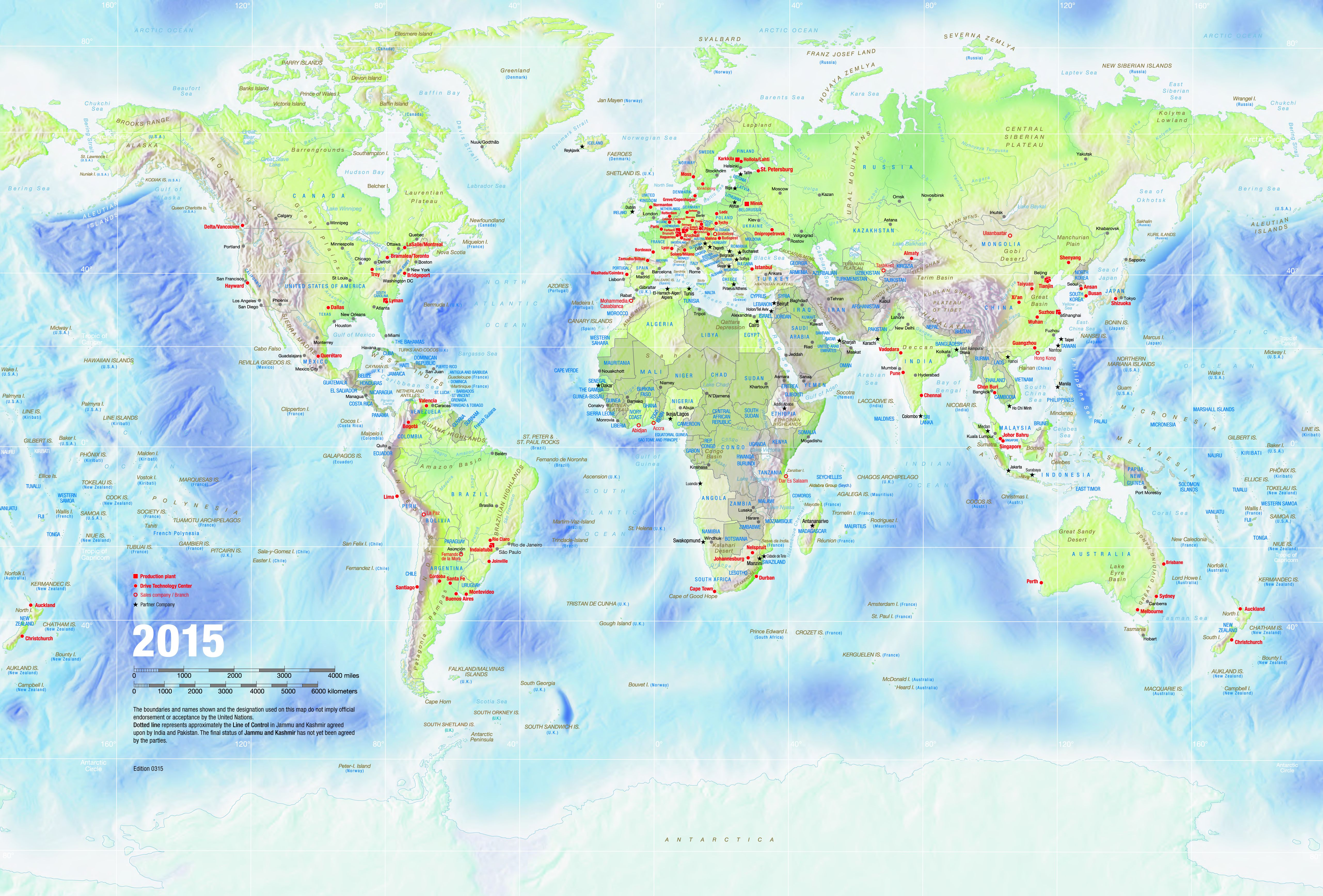 Карта виробництв, складальних центрів та технічних офісів SEW-EURODRIVE по цілому світу